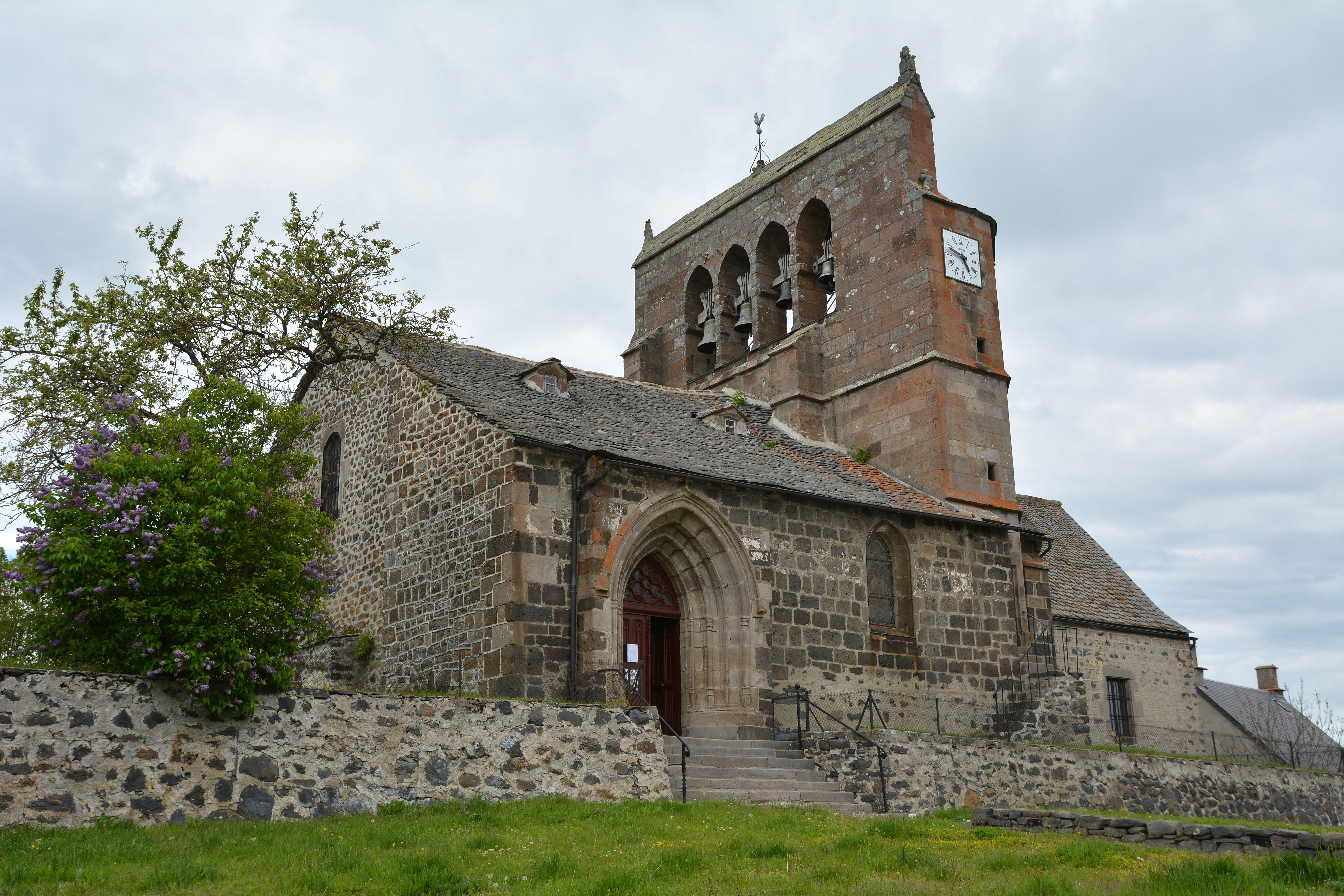 Eglise de Chalinargues, Cantal Auvergne, France